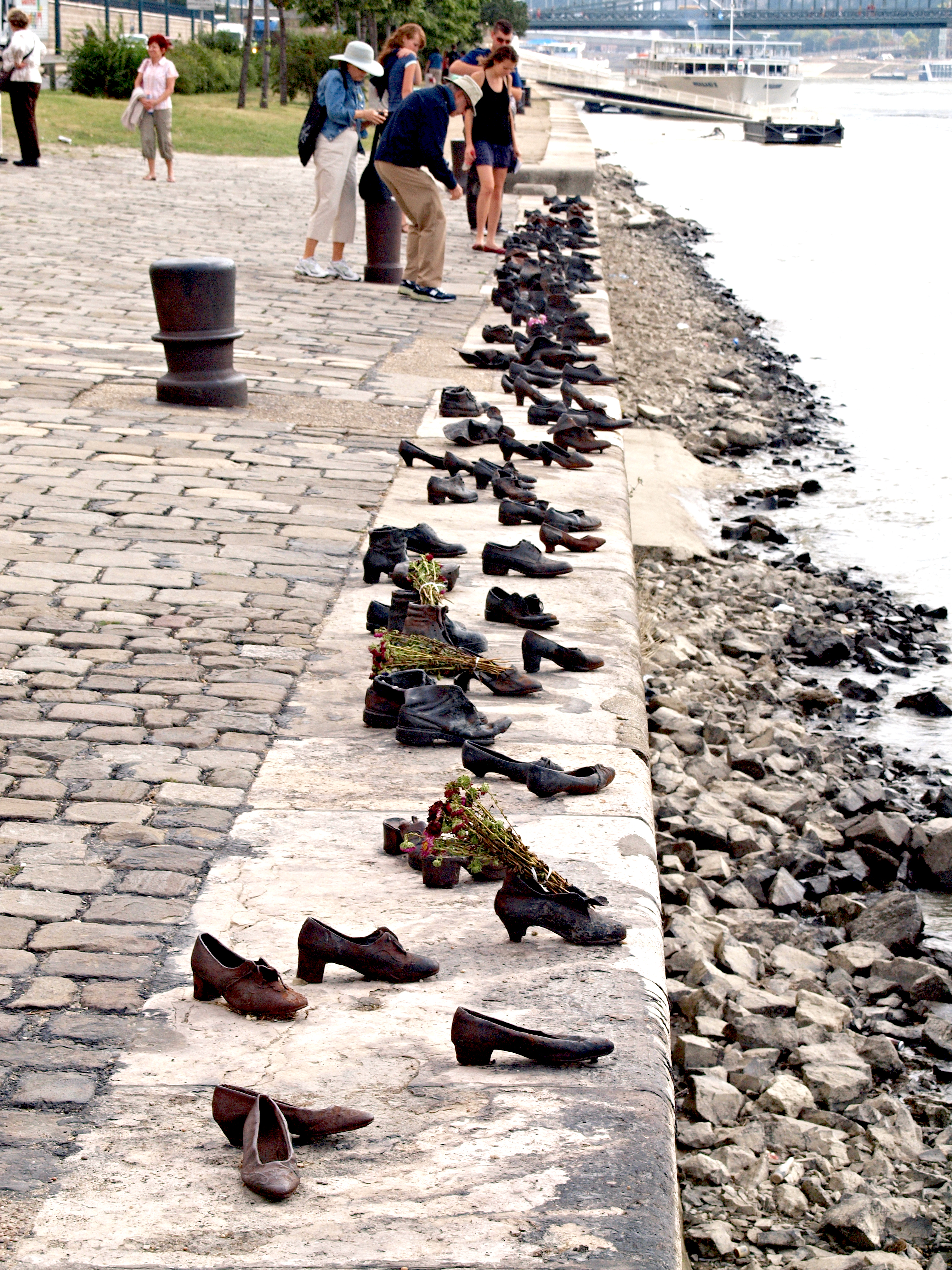 Budapest (Hungary) - A la mémoire des victimes des miliciens du Parti des Croix fléchées en 1944-1945